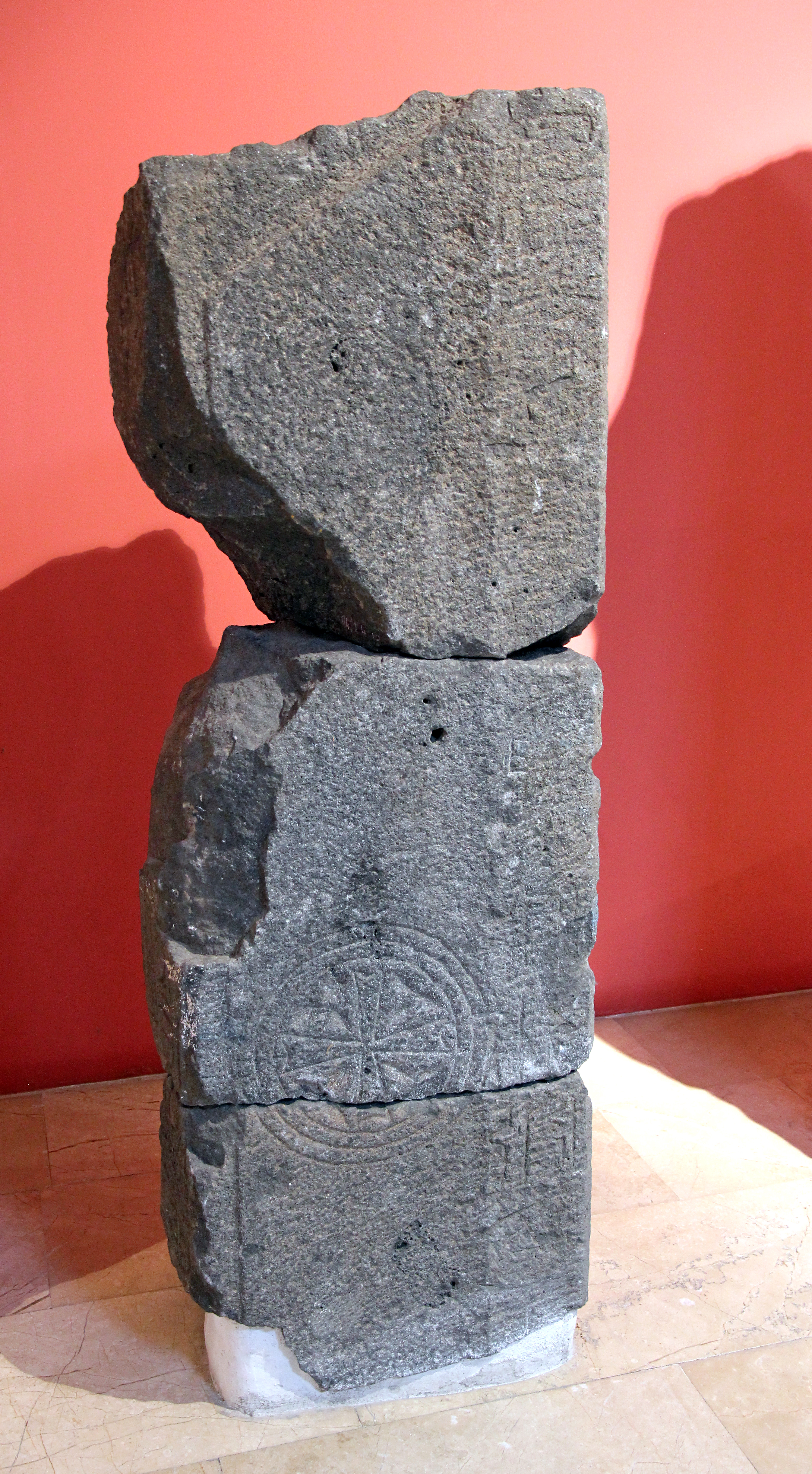 Archäologisches Museum Sivas, Zentraltürkei, Stele mit Inschrift in luwischen Hieroglyphen aus Gemerek